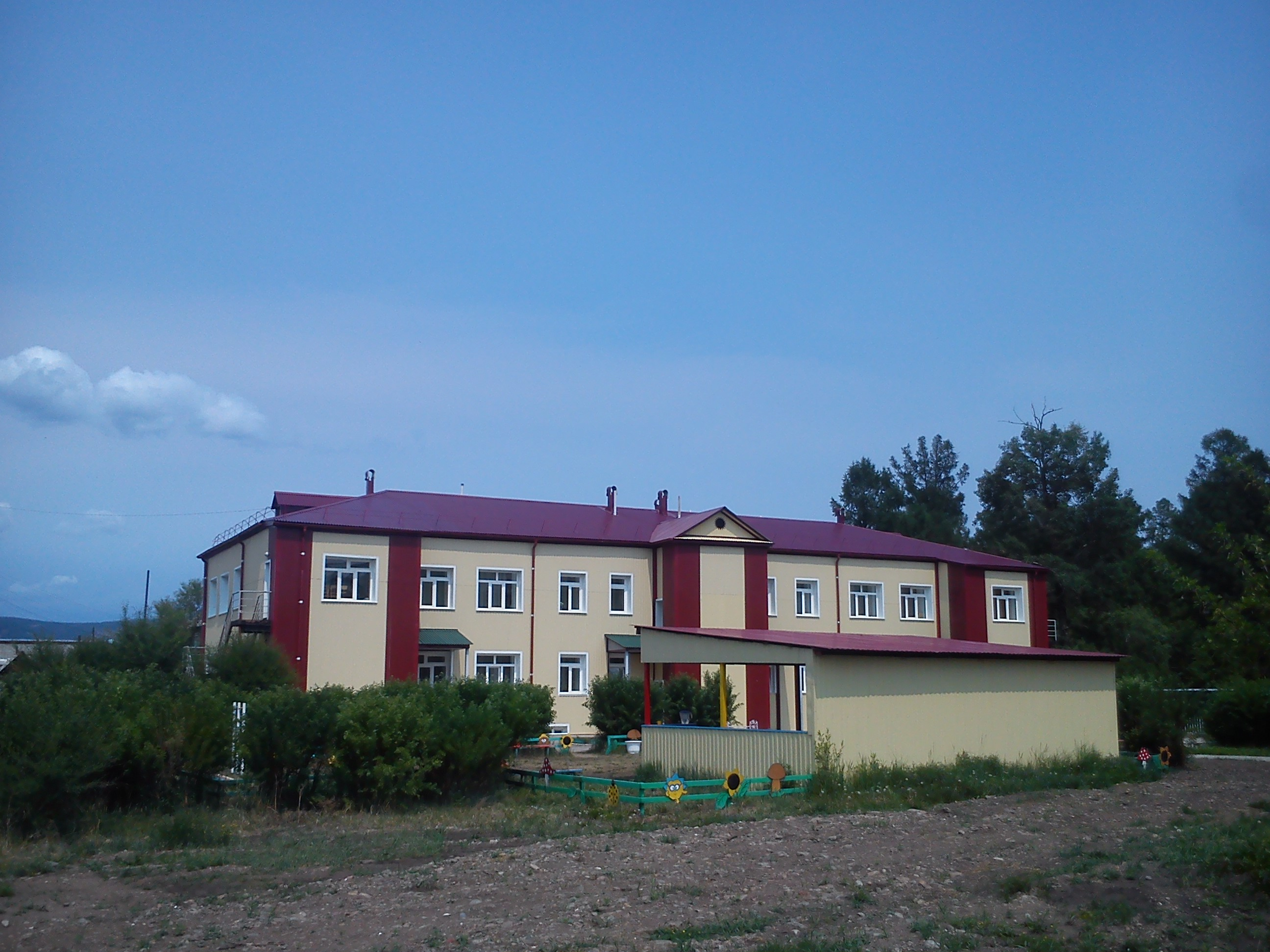 Детский сад №2 "Чебурашка", Закаменск.